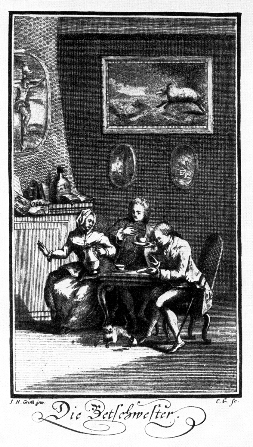 Kupferstich mit Szene aus C.F. Gellerts Die Betschwester / Scene from C F Gellert's The Praying Sister (1745)